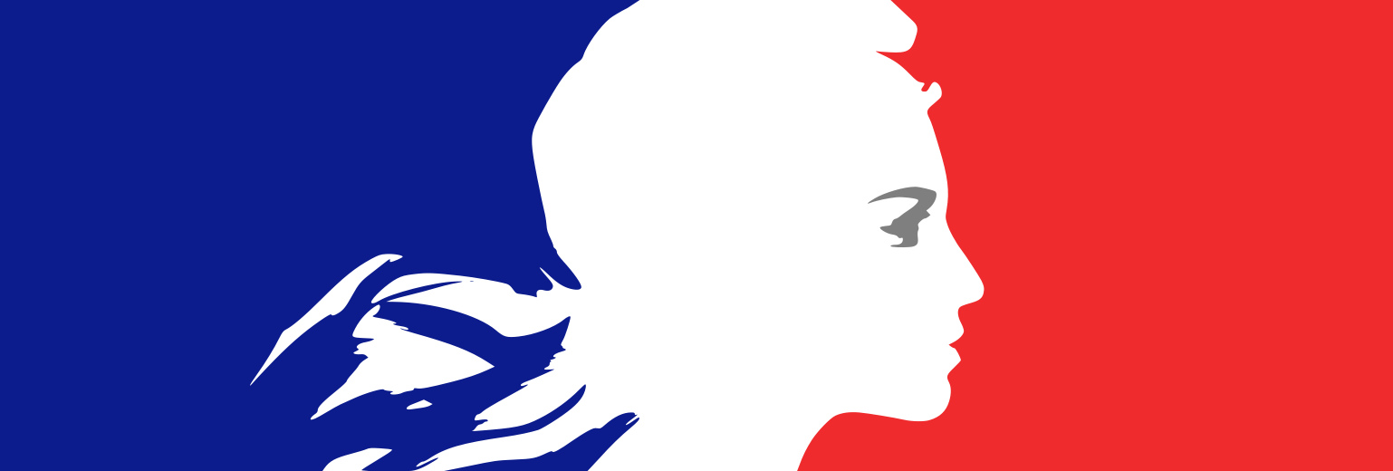 Símbol de França